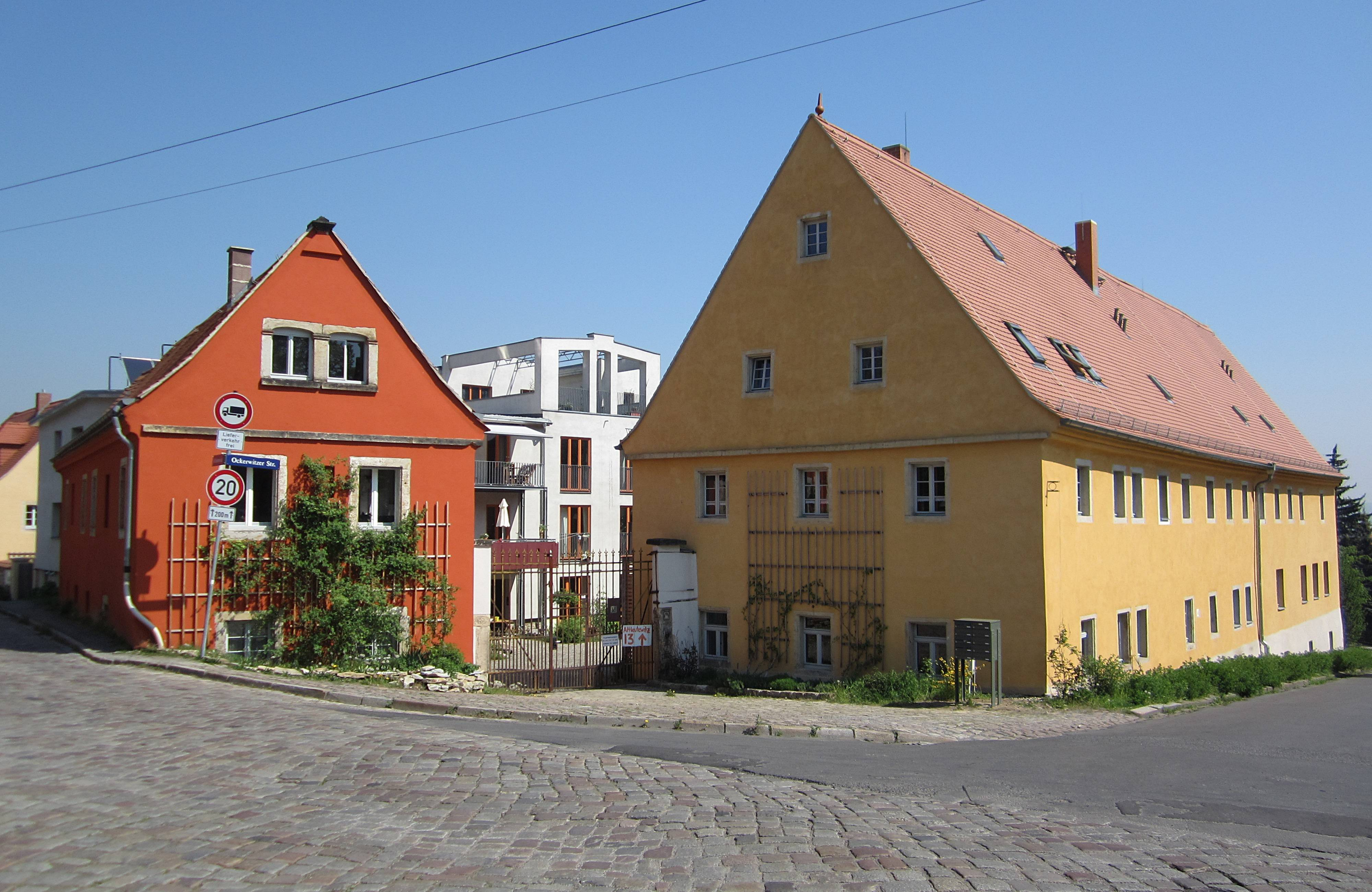 Altleutewitz 13; Wohnstallhaus, Seitengebäude, Torpfeiler und Brauereikeller eines Vierseithofes, Ockerwitzer Straße 68